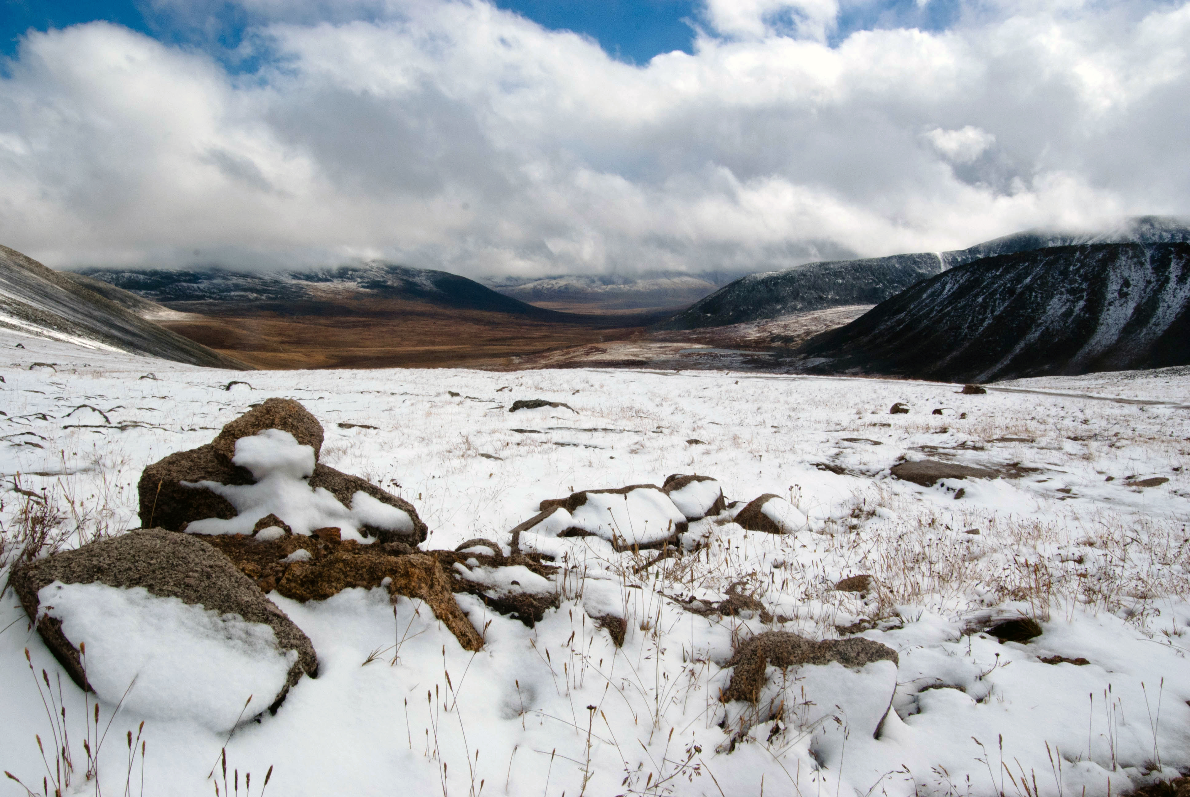 Снег на горном перевале Теплый ключ, август 2012